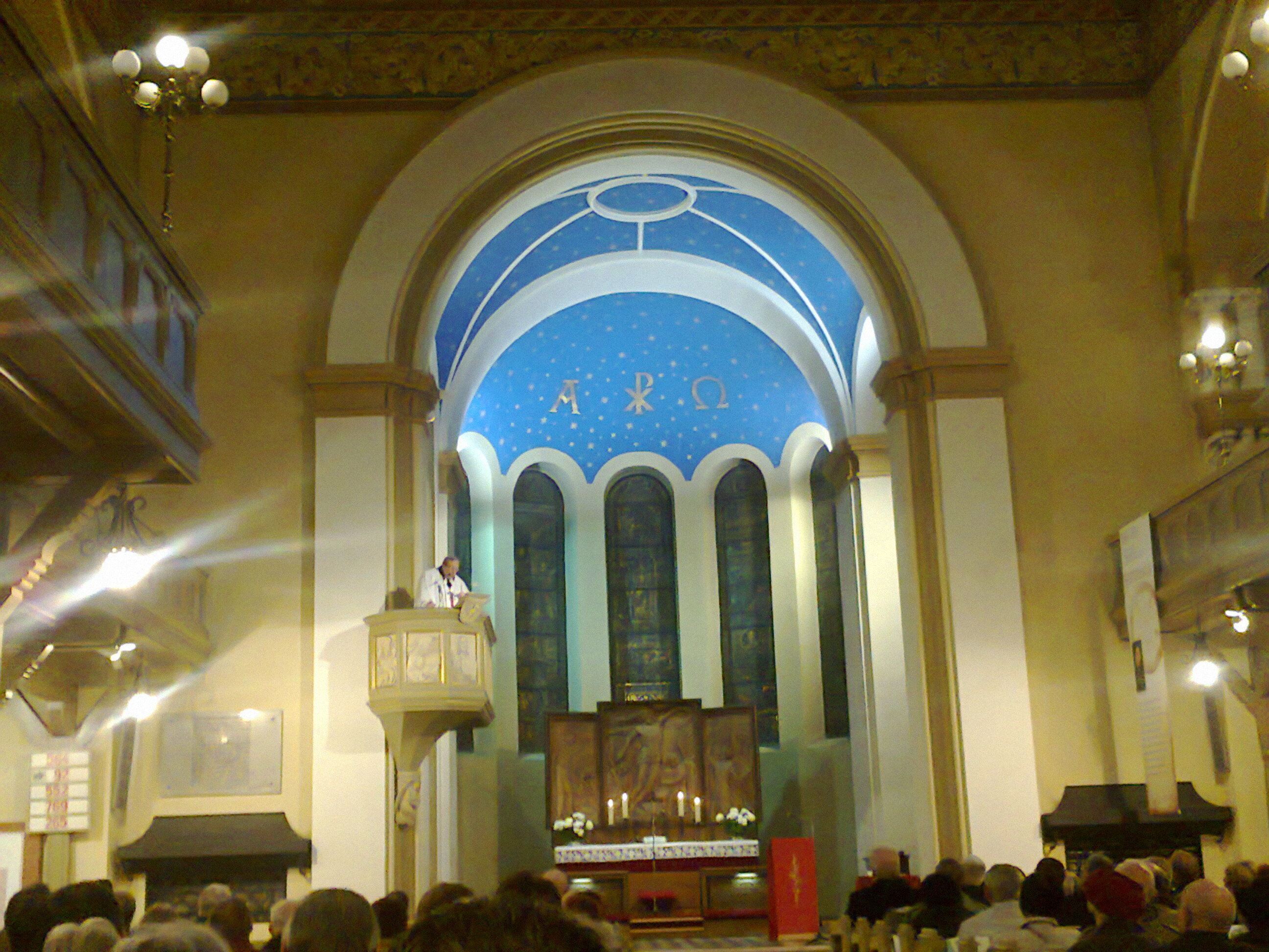 EwangLut, Katowice